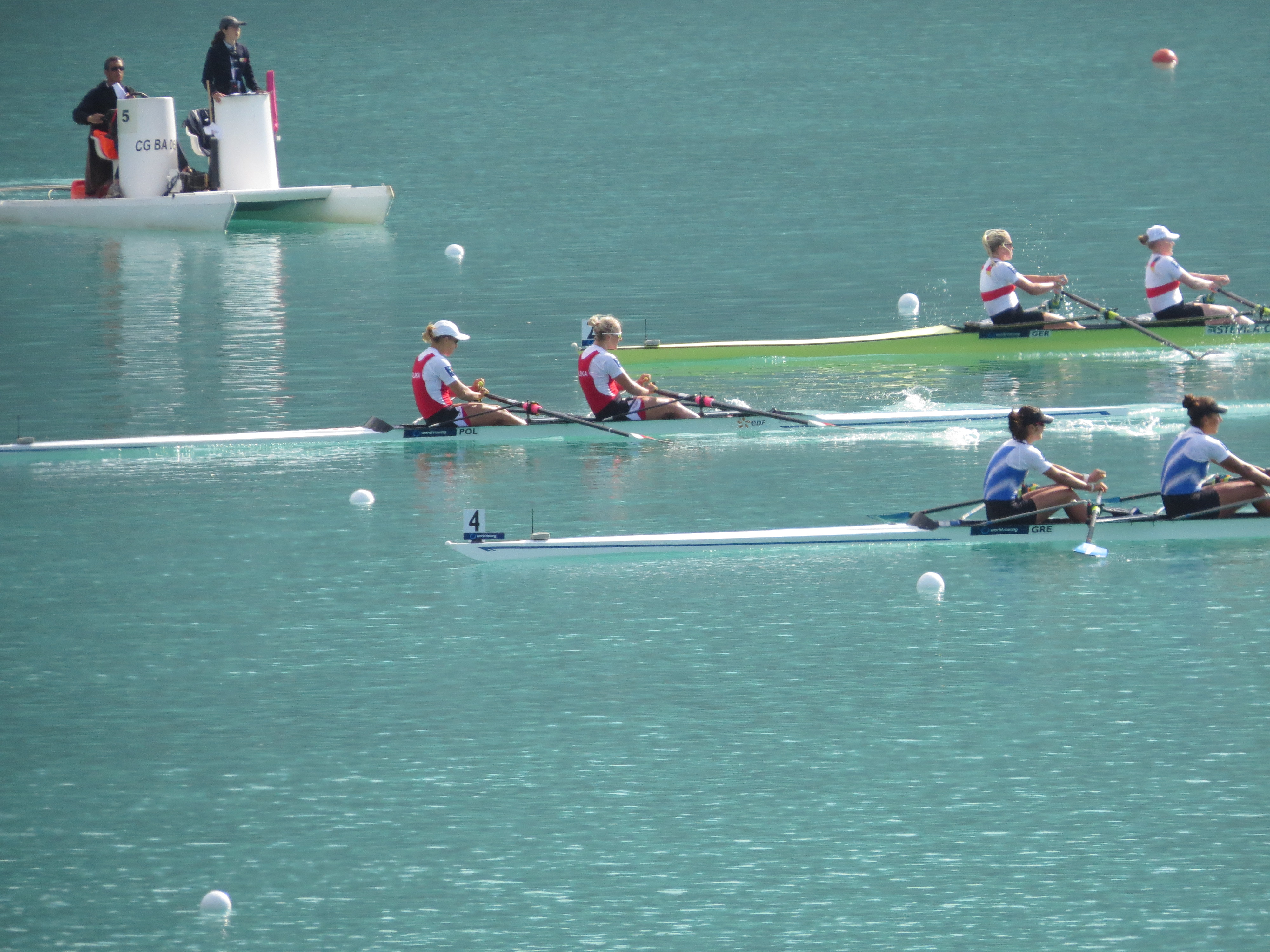 Bateaux en demi-finale du W2x GRE : NIKOLAIDOU, Aikaterini et ASOUMANAKI, Sofia POL : FULARCZYK, Magdalena et MADAJ, Natalia GER : LIER, Julia et ADAMS, Mareike